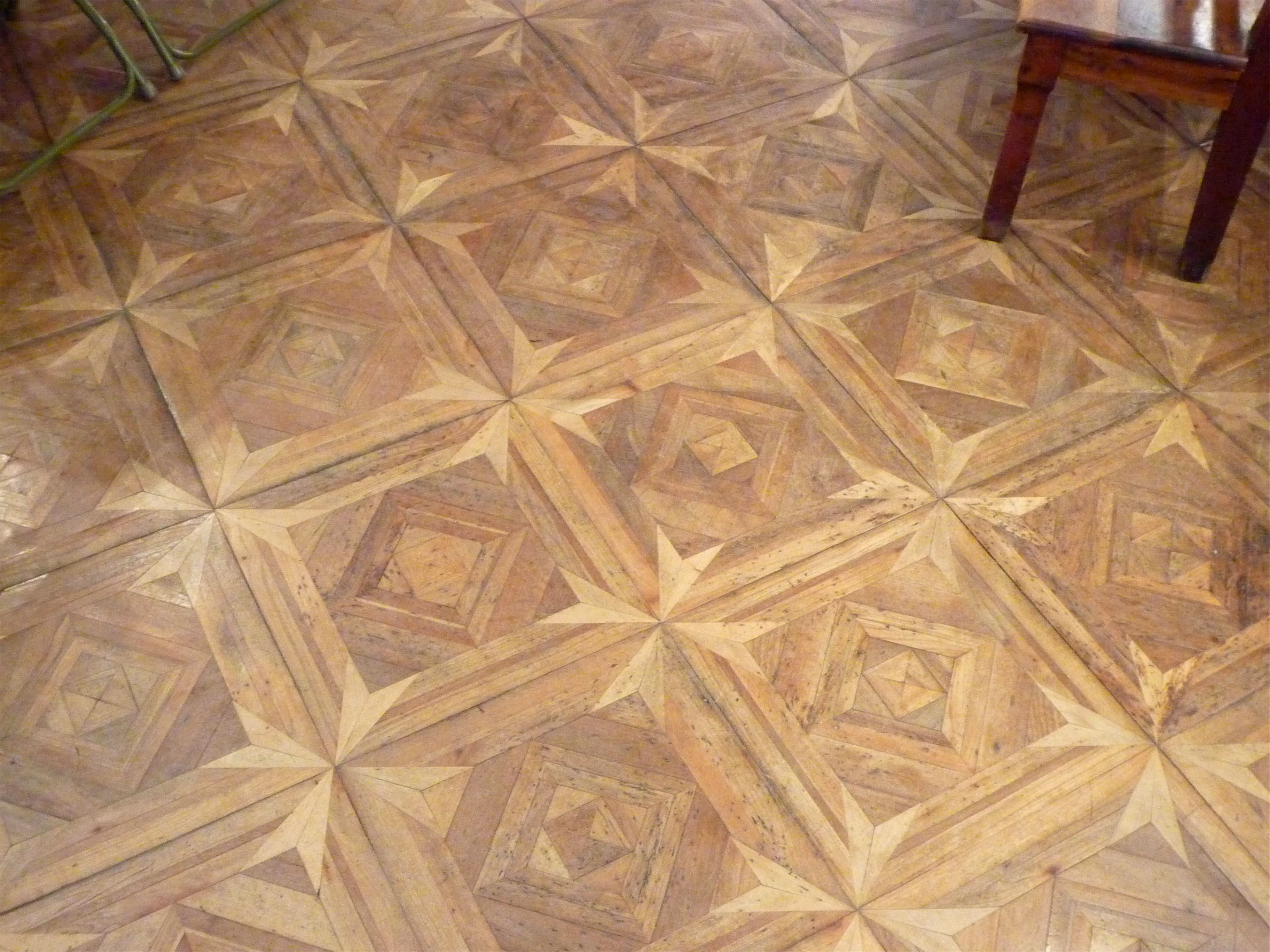 Parquet au rez-de-chaussée de l'Hôtel de Lesdiguières à Grenoble.